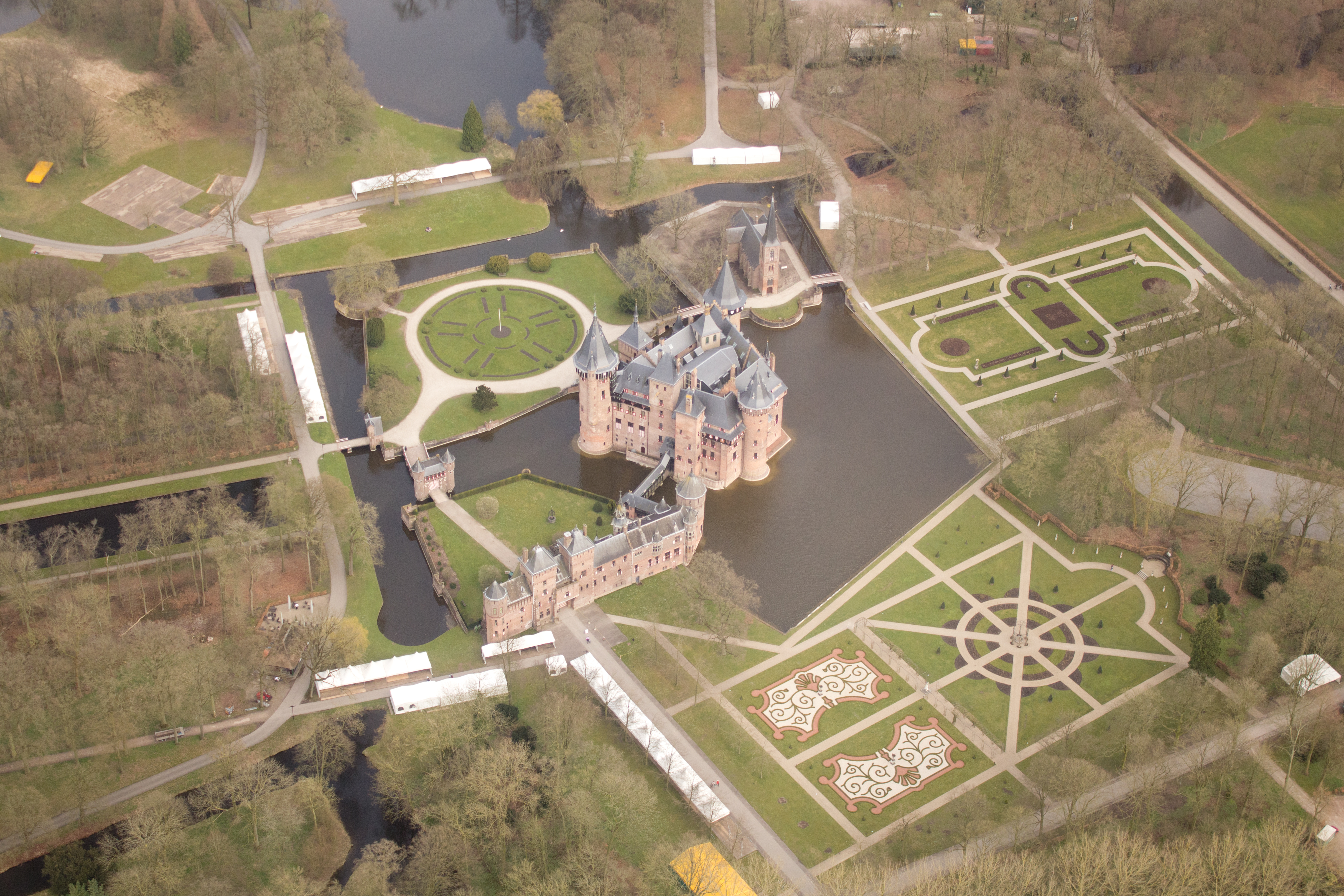 Kasteel de Haar, Haarzuilens. Met dank aan Jeroen Komen.